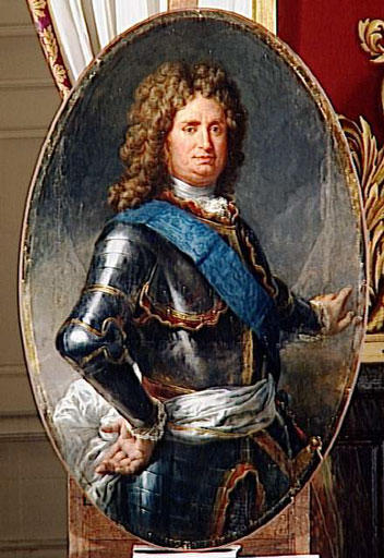 Commissioned in 1840 by Louis Philippe I for the Musée national du Château de Versailles